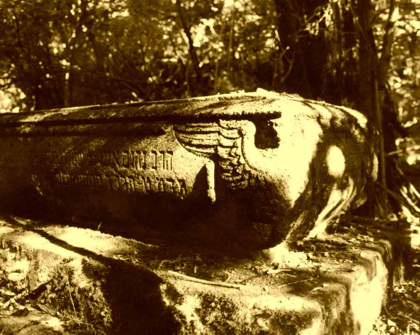 מצבתו